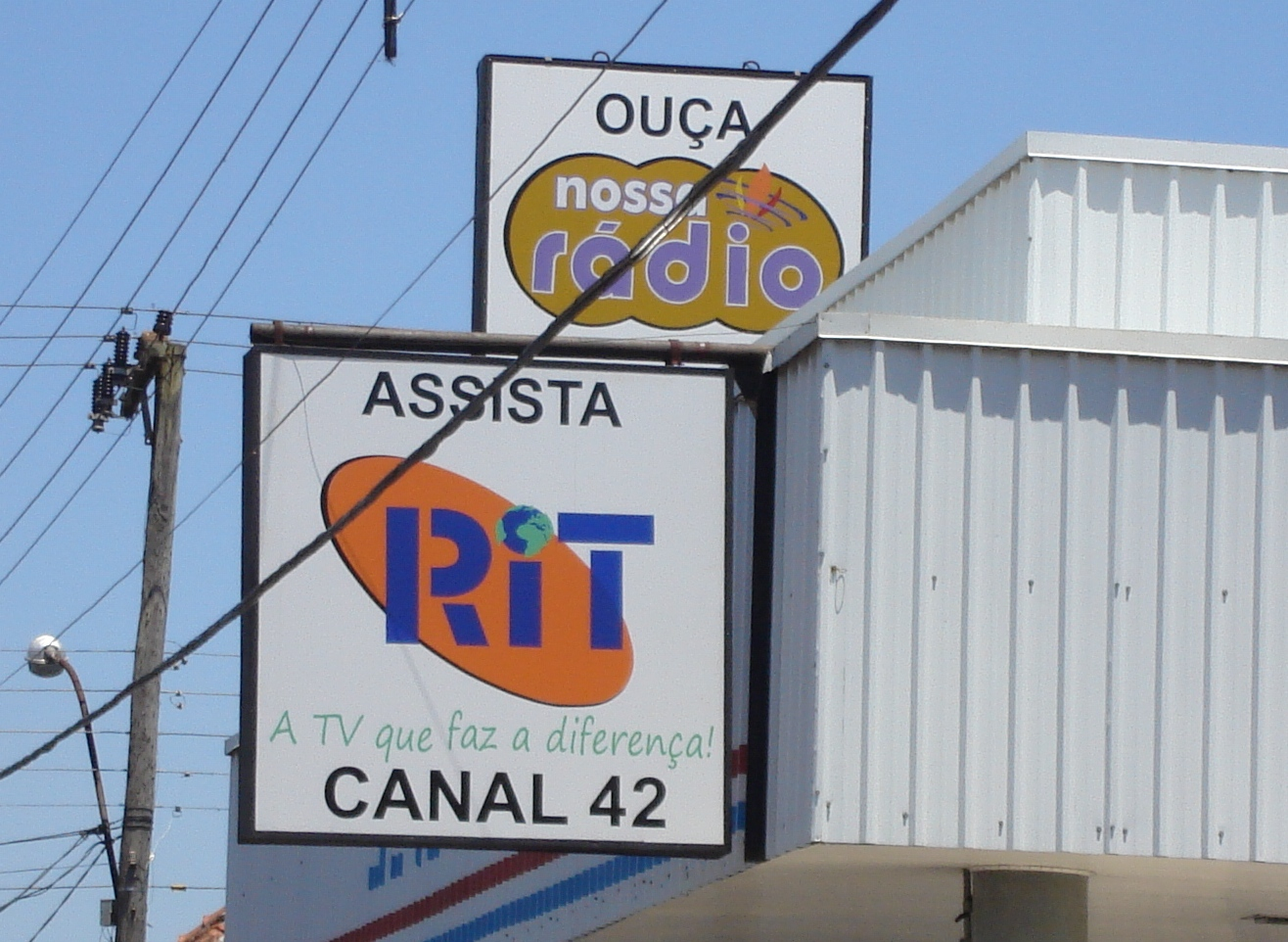 Propagandas da RIT e da Nossa Rádio próximas à Igreja Internacional da Graça de Deus em Montenegro, RS.